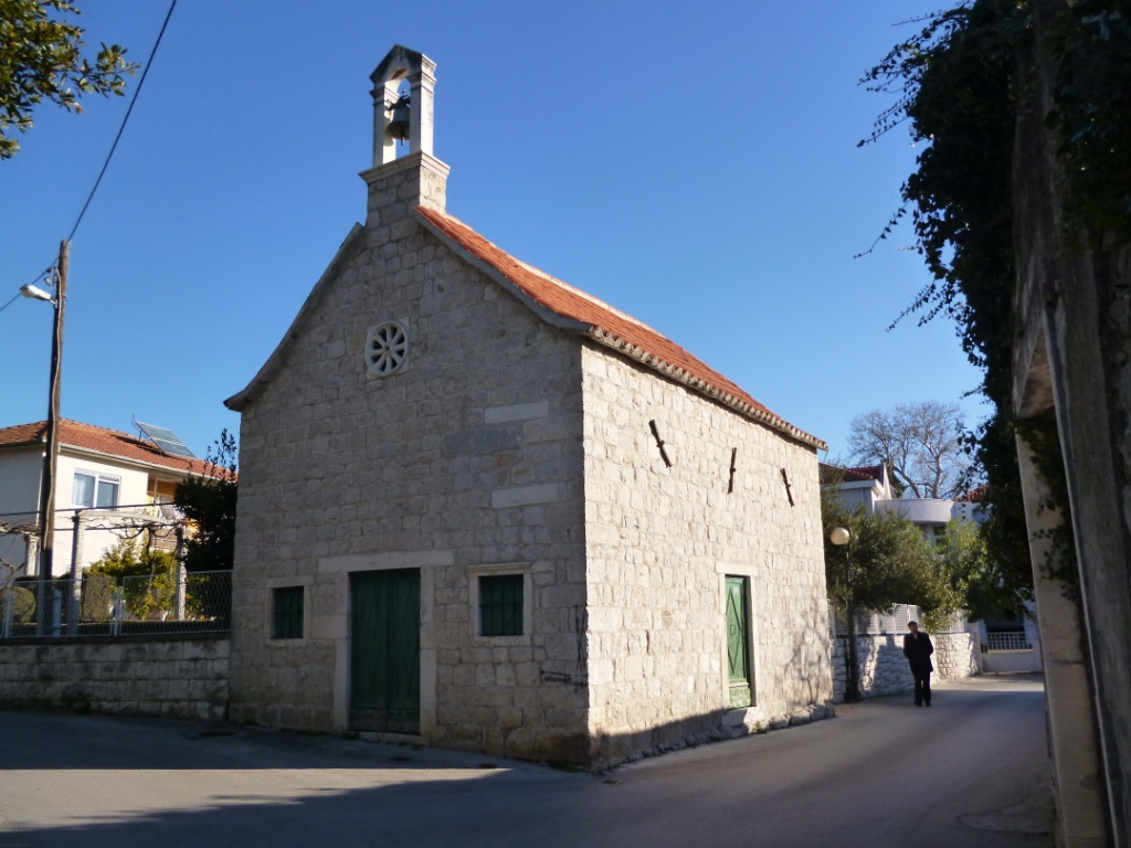 Sv. Ivan u Rušincu - Kaštel Lukšić